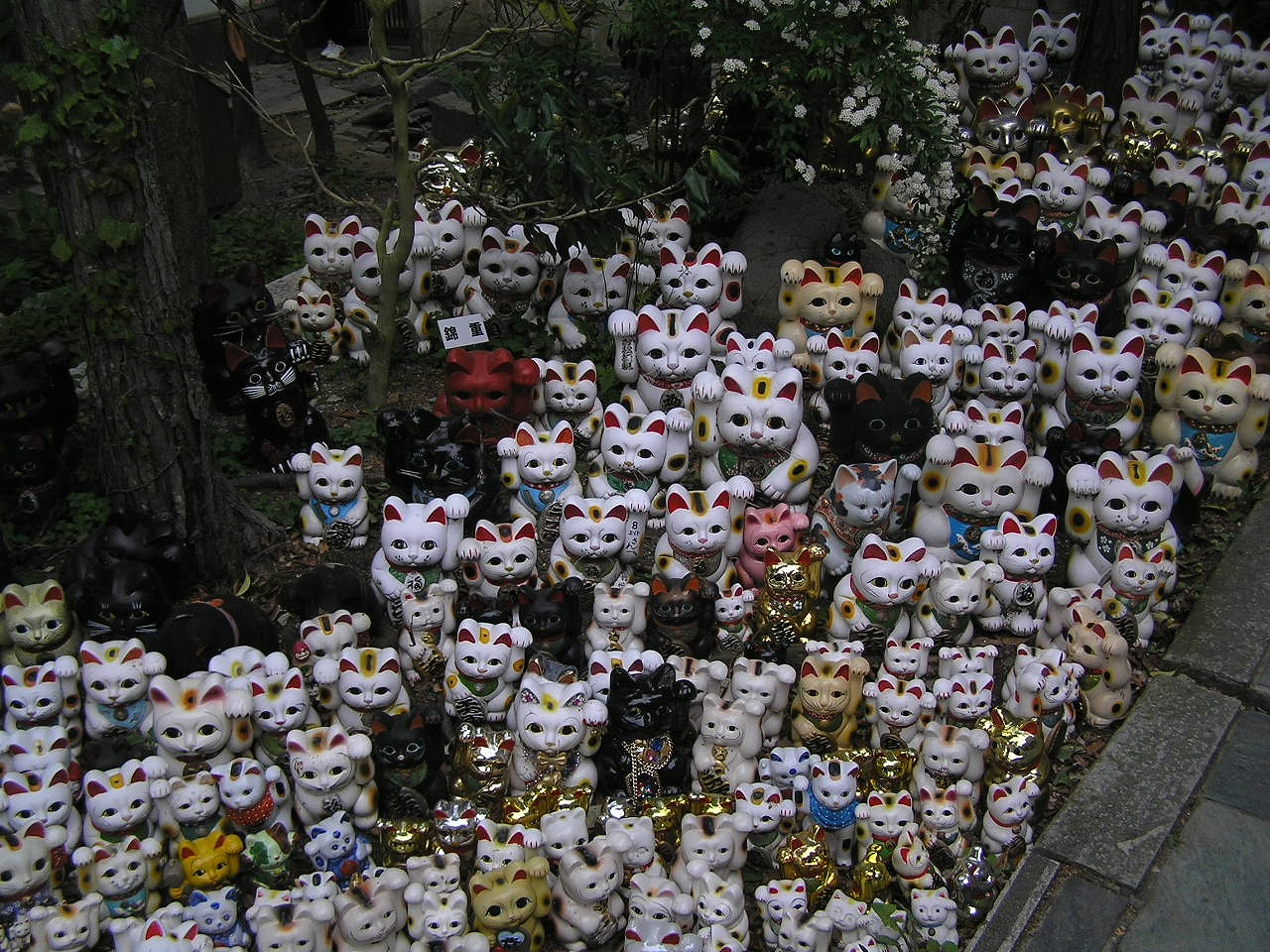 淡島神社人形3